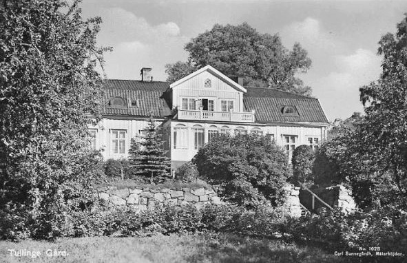 Tullinge gårds huvudbyggnad som brann ner i februari 1943.